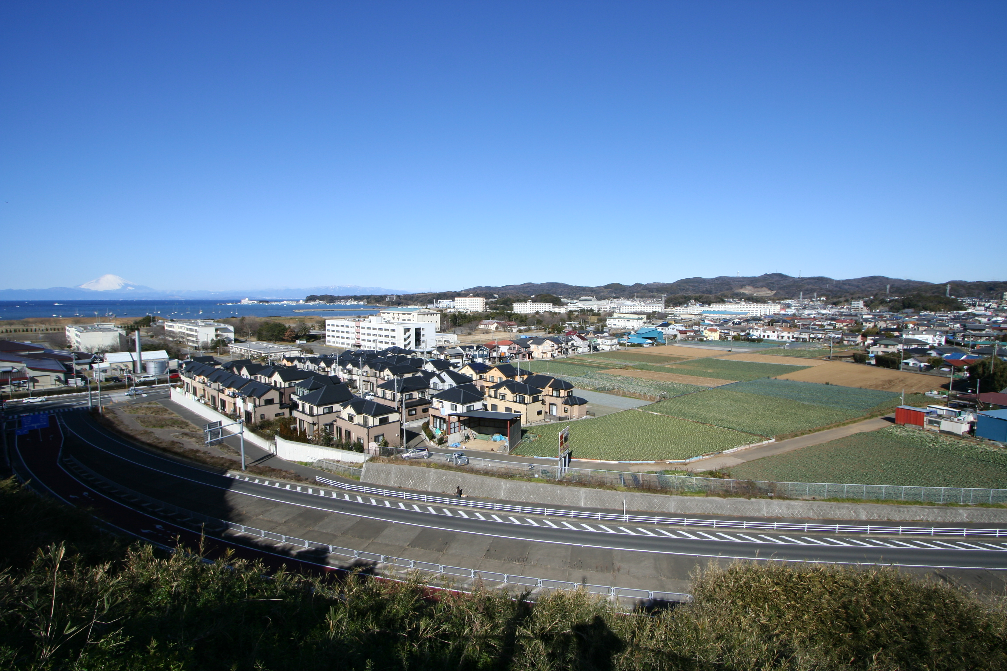 横須賀市林５丁目、三浦縦貫道路林インター付近から西側を撮影。写真奥は相模湾、その手前は陸上自衛隊武山駐屯地。